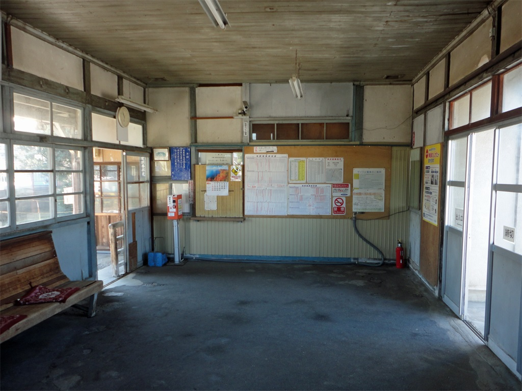 富山地方鉄道本線経田駅駅舎内